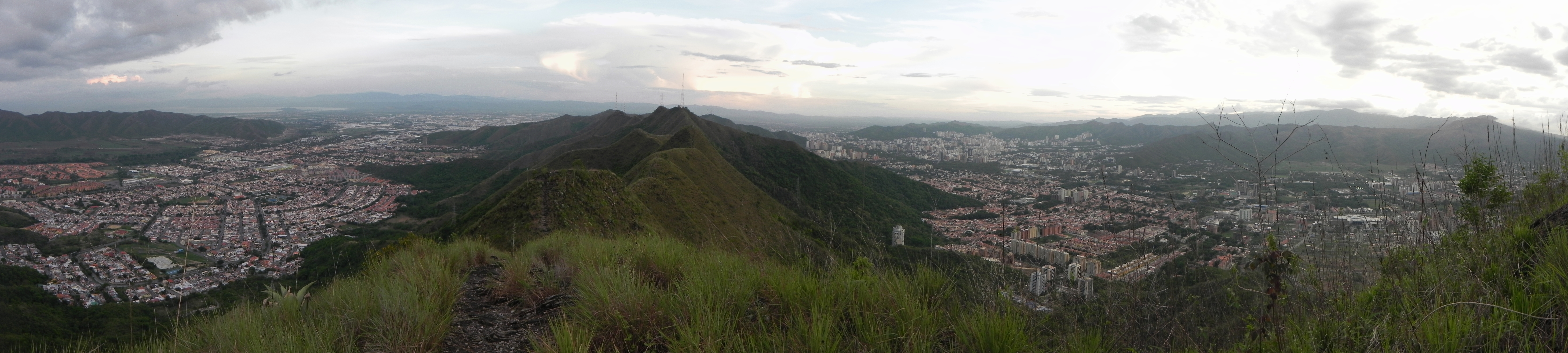 Panorámica del Norte de Valencia